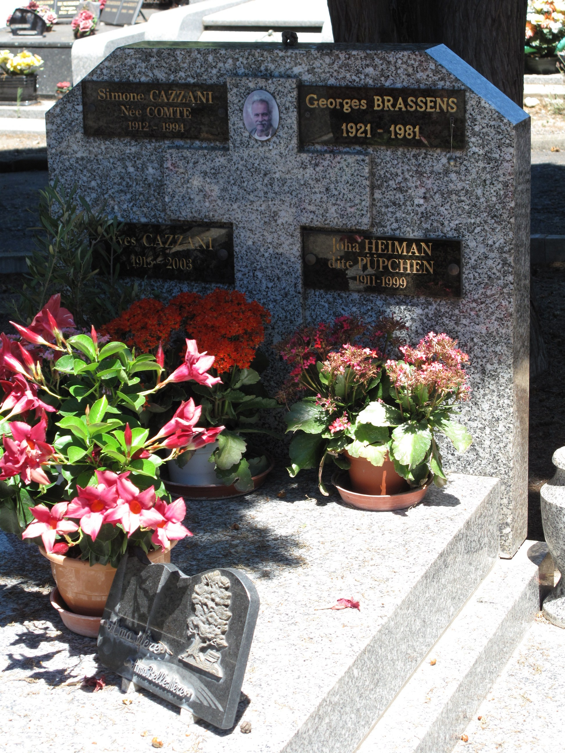 Tombe de Georges Brassens au cimetière de Sète (France).